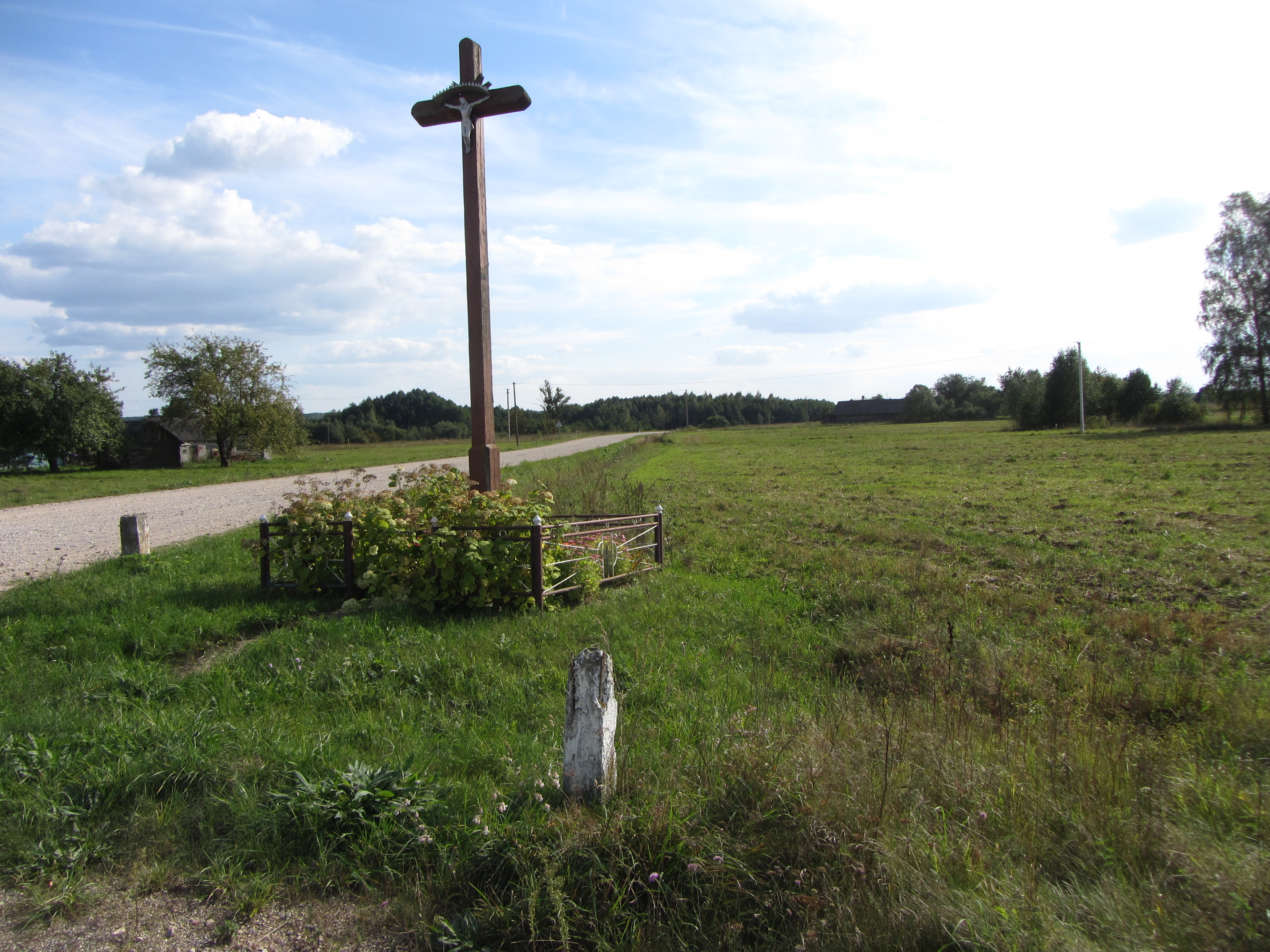 Kužiai 17156, Lithuania